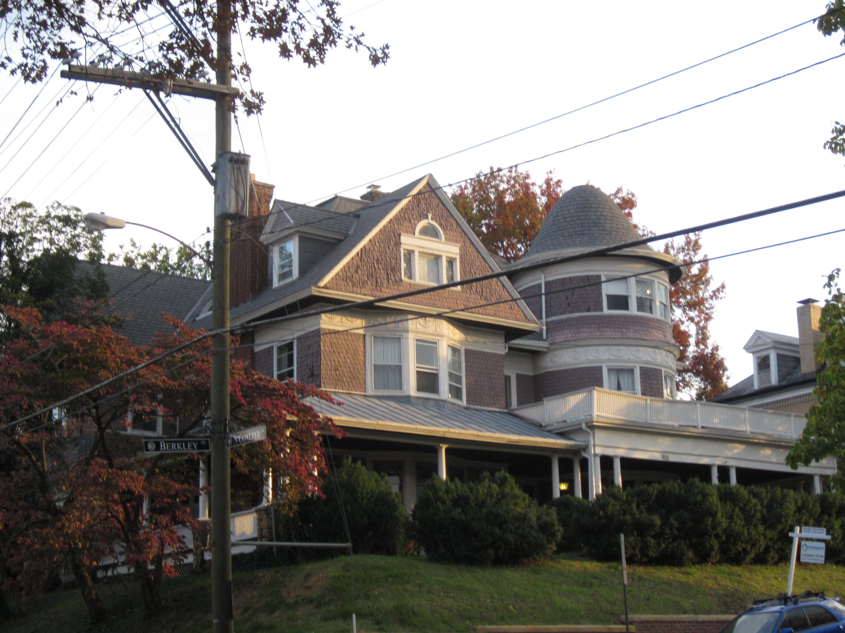 Staunton, Virginia